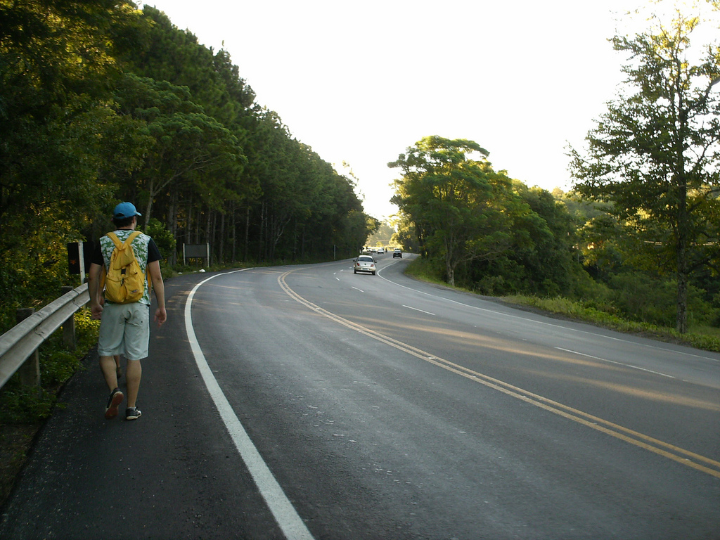 La BR 158 près d'Itaara (Santa Maria) Brésil